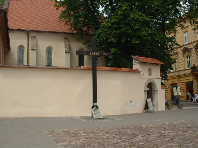 Monument in Krakau ter nagedachtenis aan de slachtoffers van Katyn